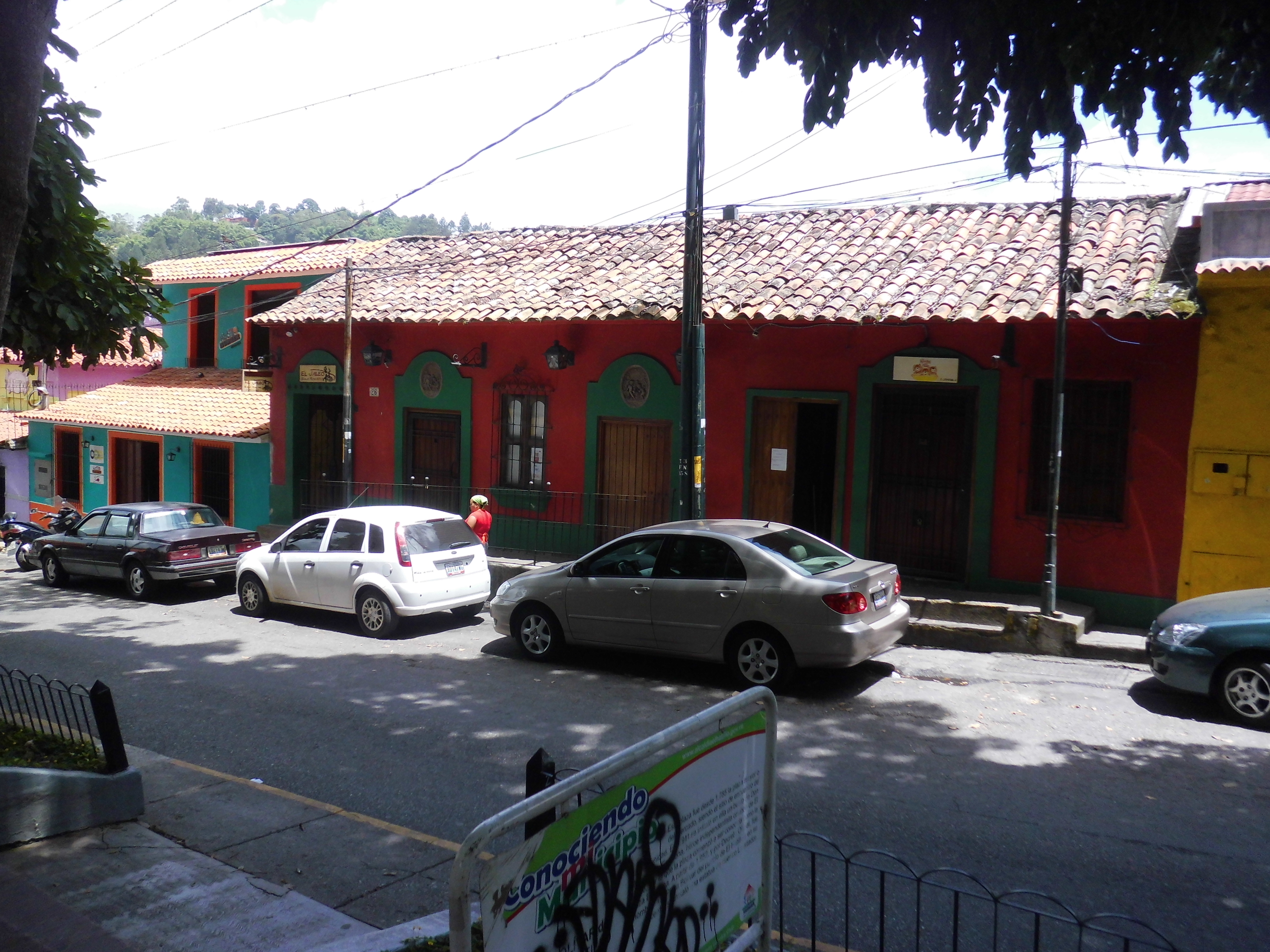 Casa de Baltazar de León fundador del pueblo de El Hatillo, municipio El Hatillo, estado Miranda - Venezuela.